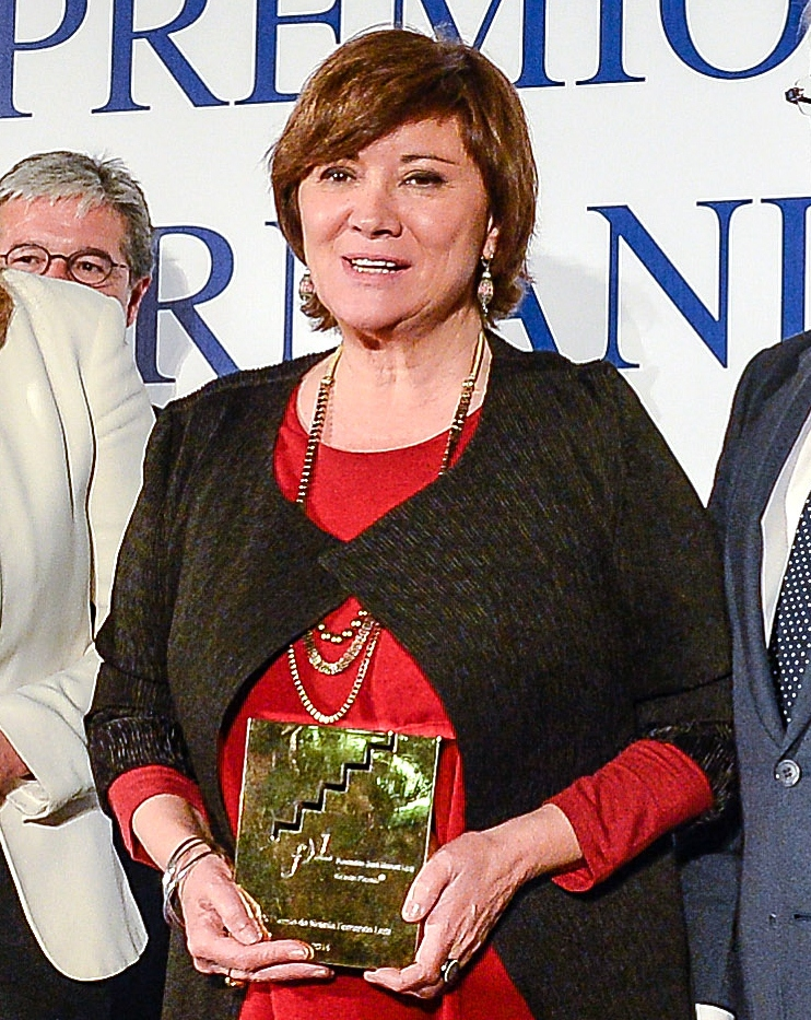 Nativel Preciado recibiendo el premio Fernando Lara